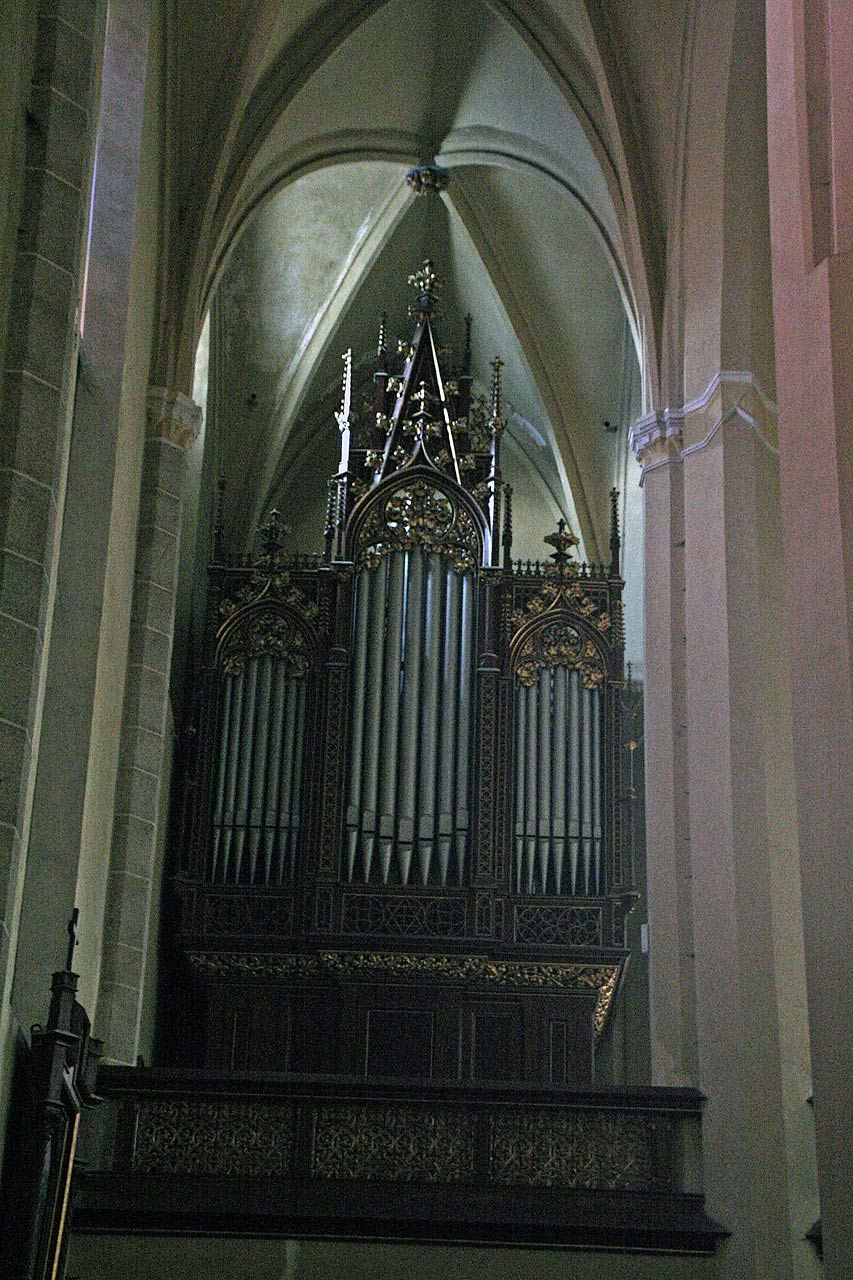 Hauptorgel der Klosterkirche Vyssi Brod, linker Teil